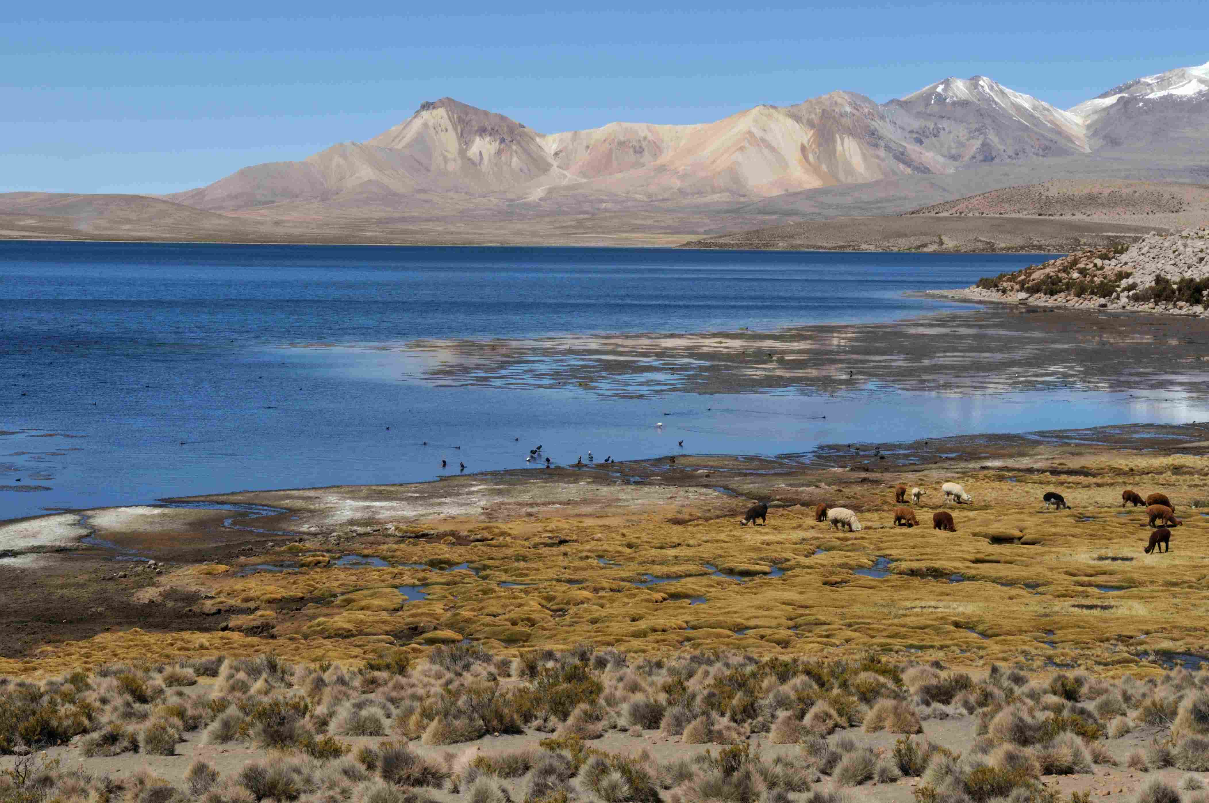 Bolivia